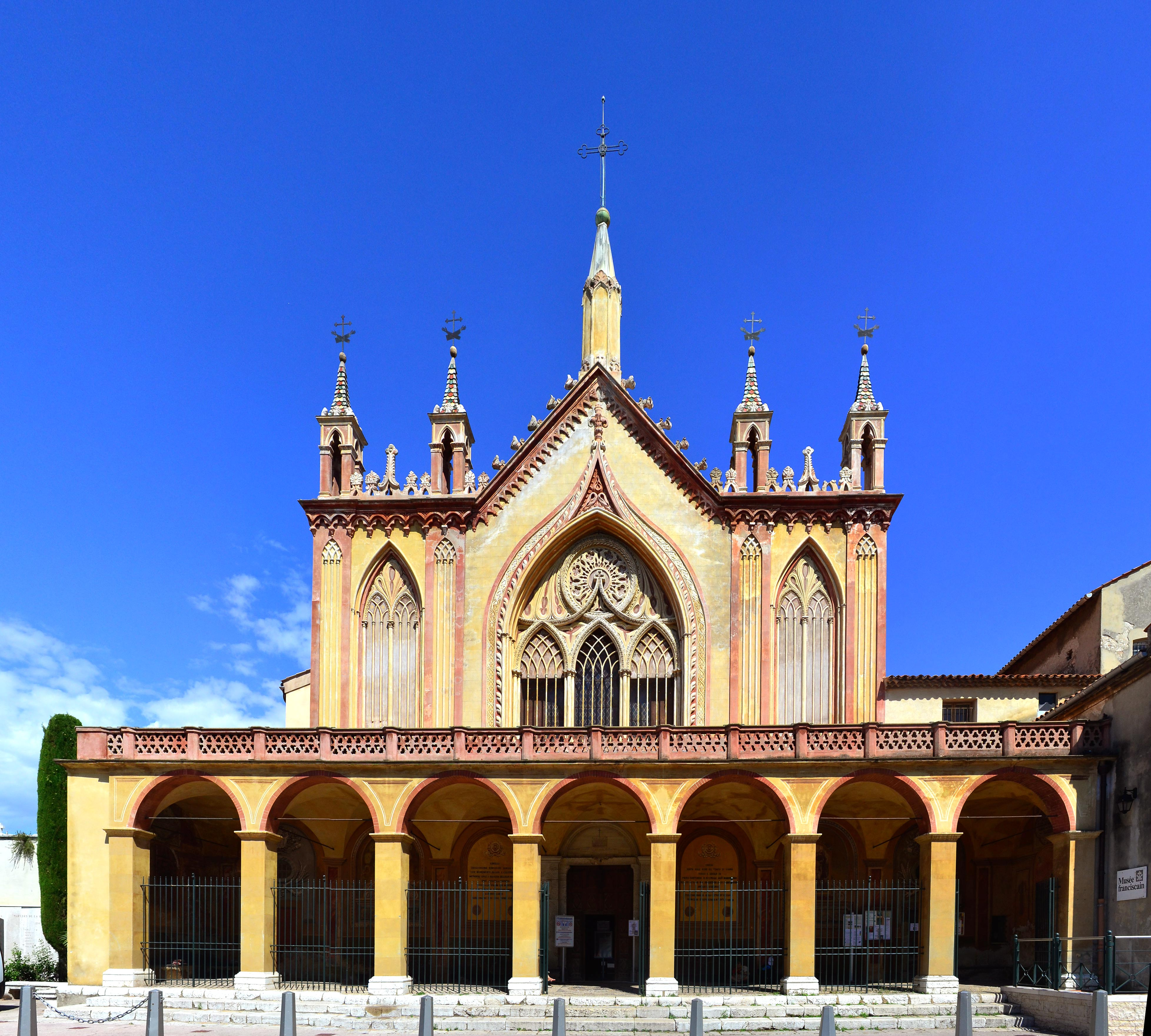 Monastère de Cimiez (Nice, France)